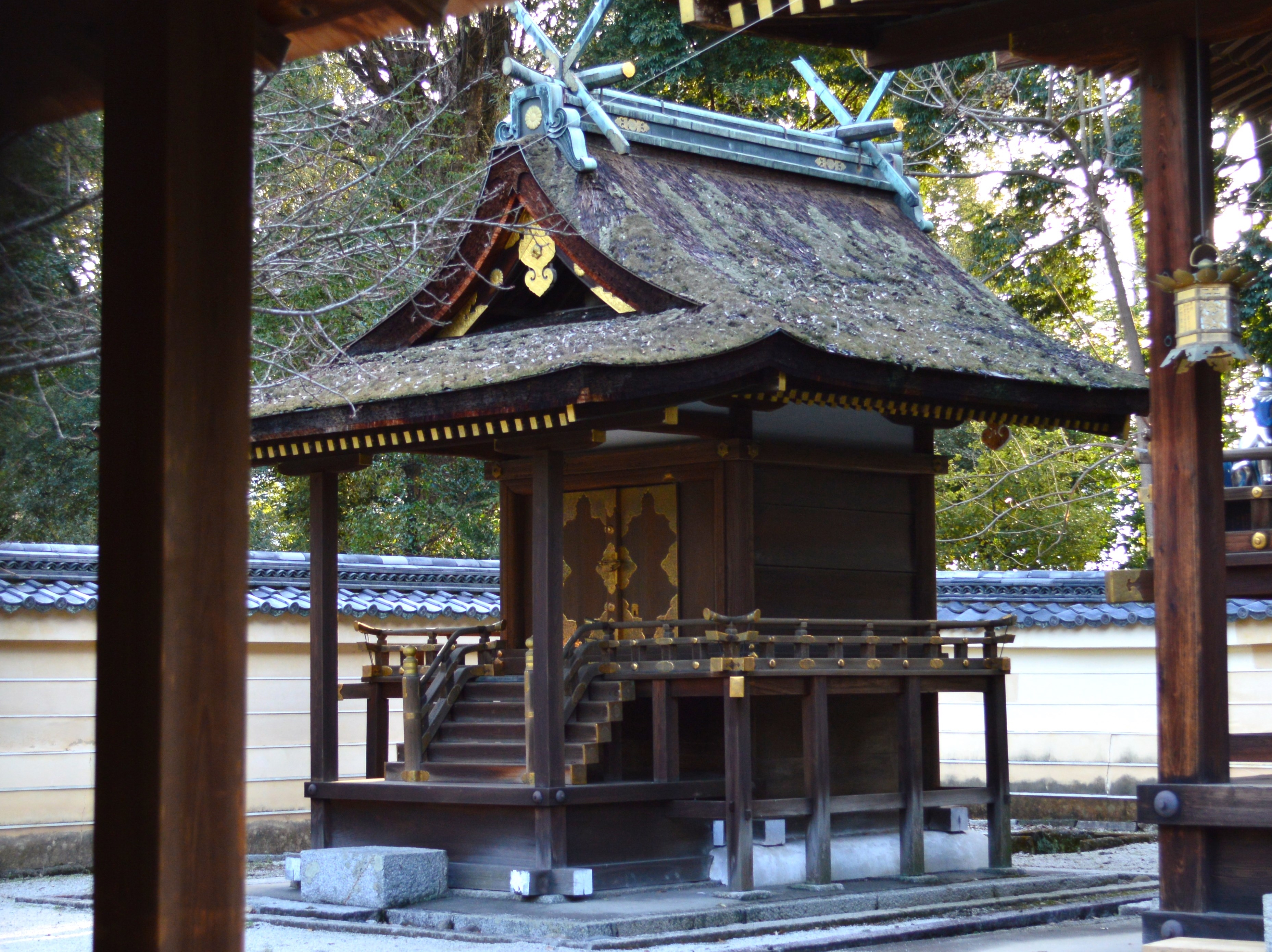 平野神社 (京都市) 縣神社